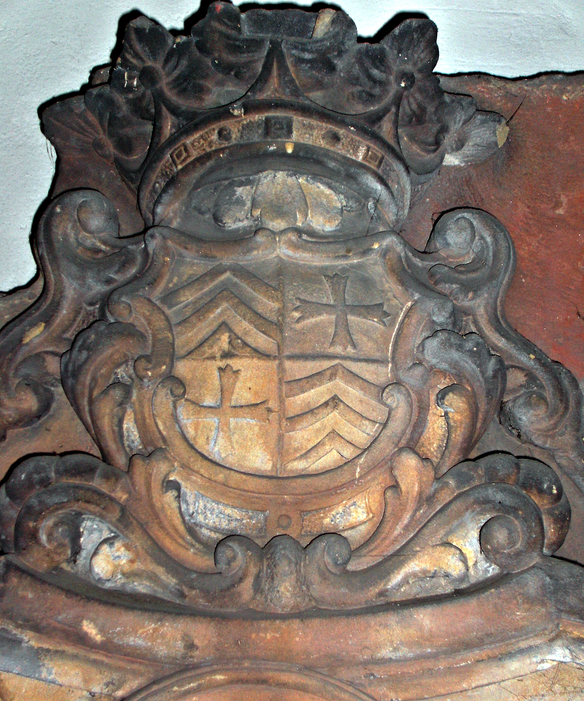 Wappen des Adelsgeschlechtes von Rollingen, vom Epitaph des Domherrn Karl Wolfgang Heinrich von Rollingen (+1730)